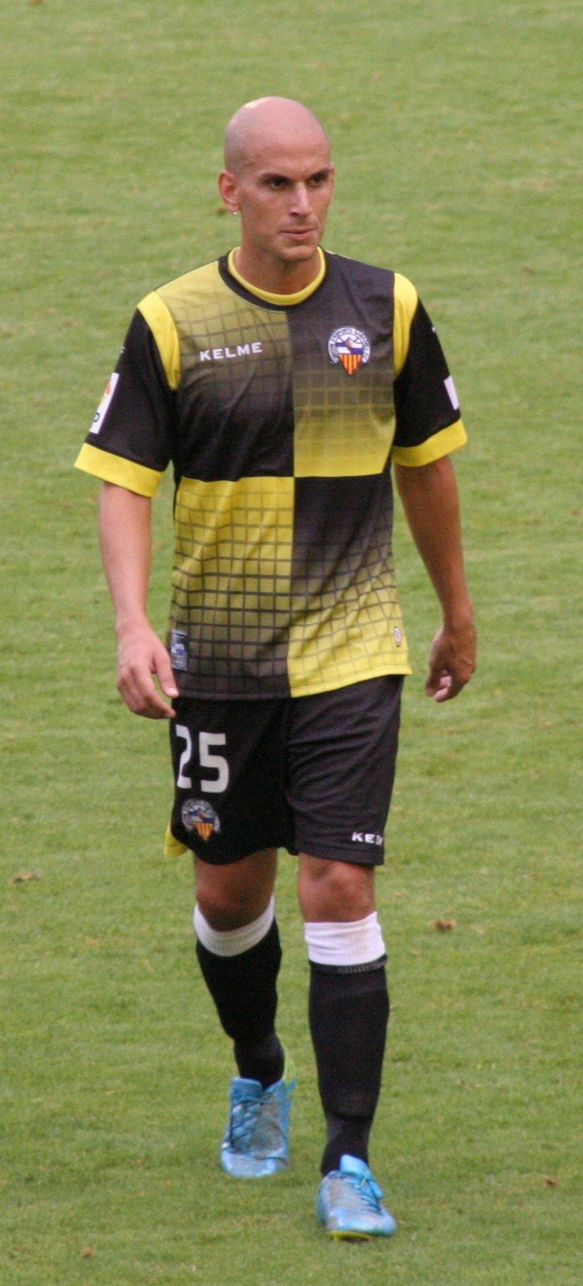 Javi Hervás agost 2014